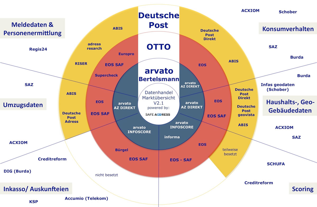 Marktübersicht Adresshandel